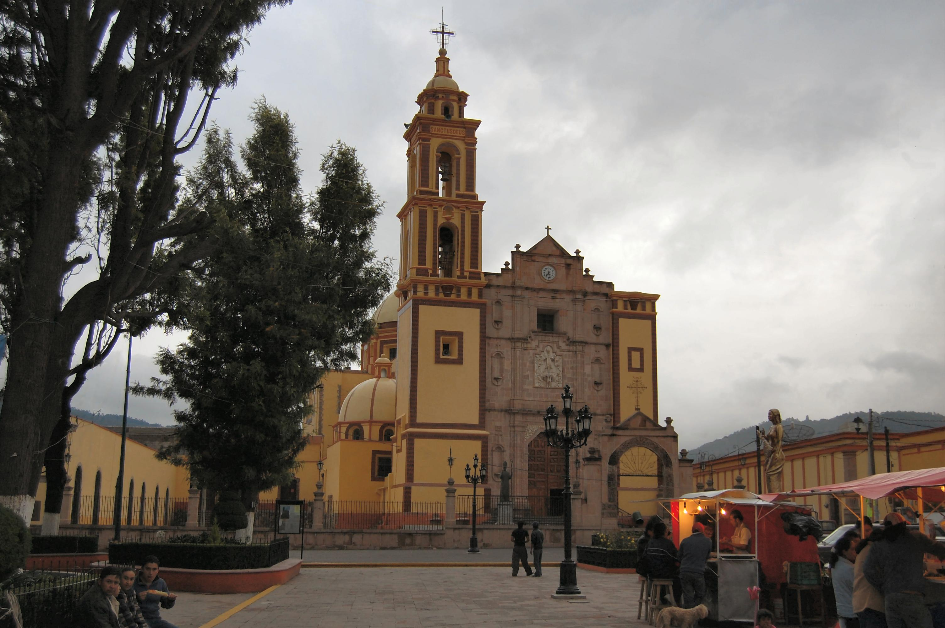 Tlaxco, Tlaxcala